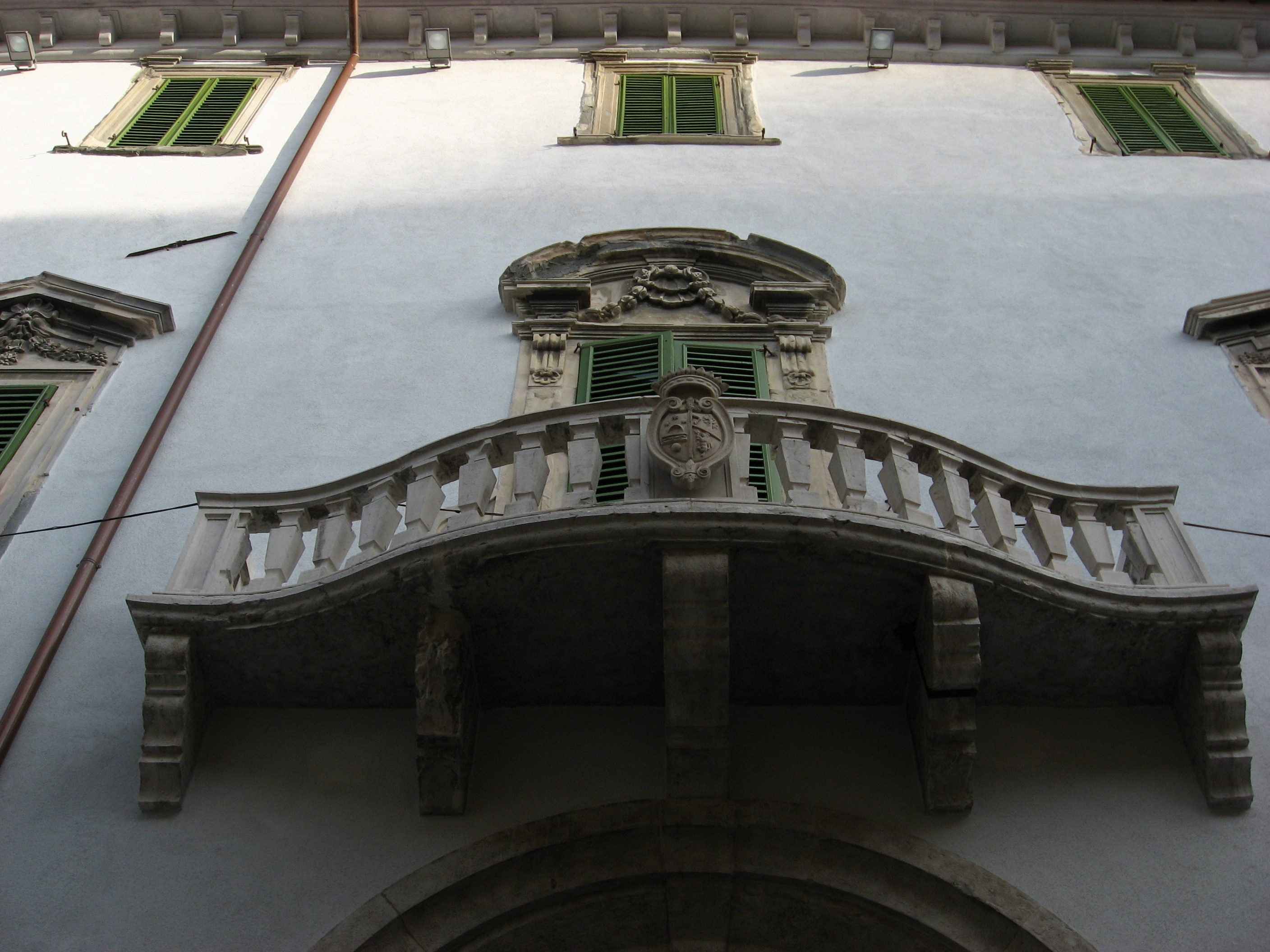 Palazzo Berardi Mochi-Zamperoli in Cagli - Part. della facciata principale